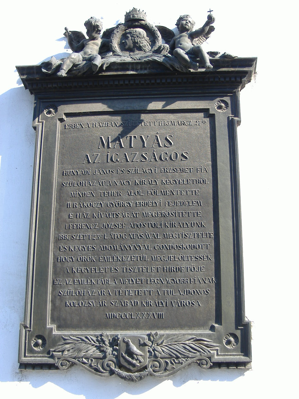 Cluj-Napoca, Casa lui Matei Corvin (placă comemorativă în l.maghiară), str. Matei Corvin nr.6